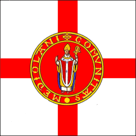 Bandiera della Aurea Repubblica Ambrosiana di Milano.